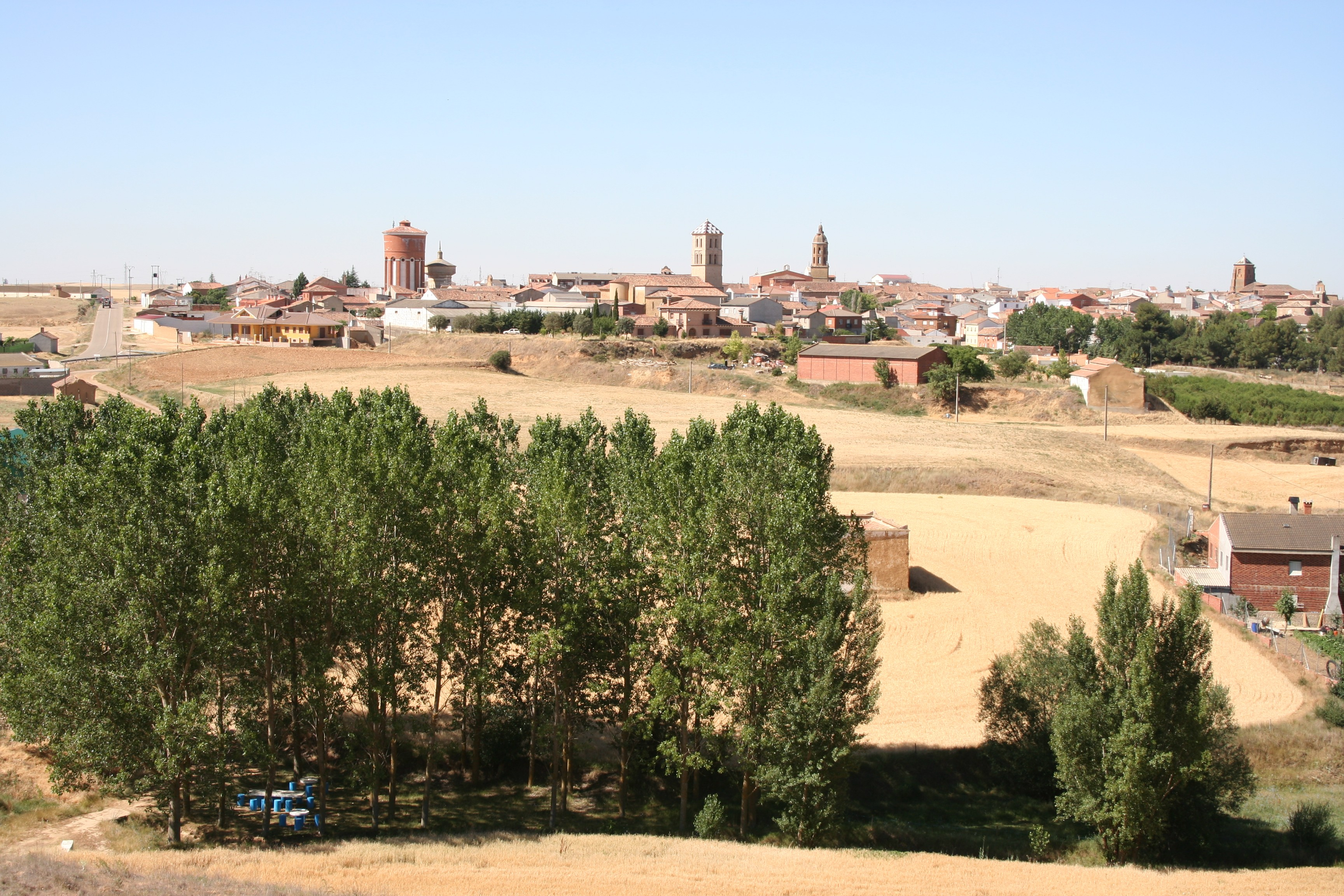 Vista general del pueblo desde el teso Miravete